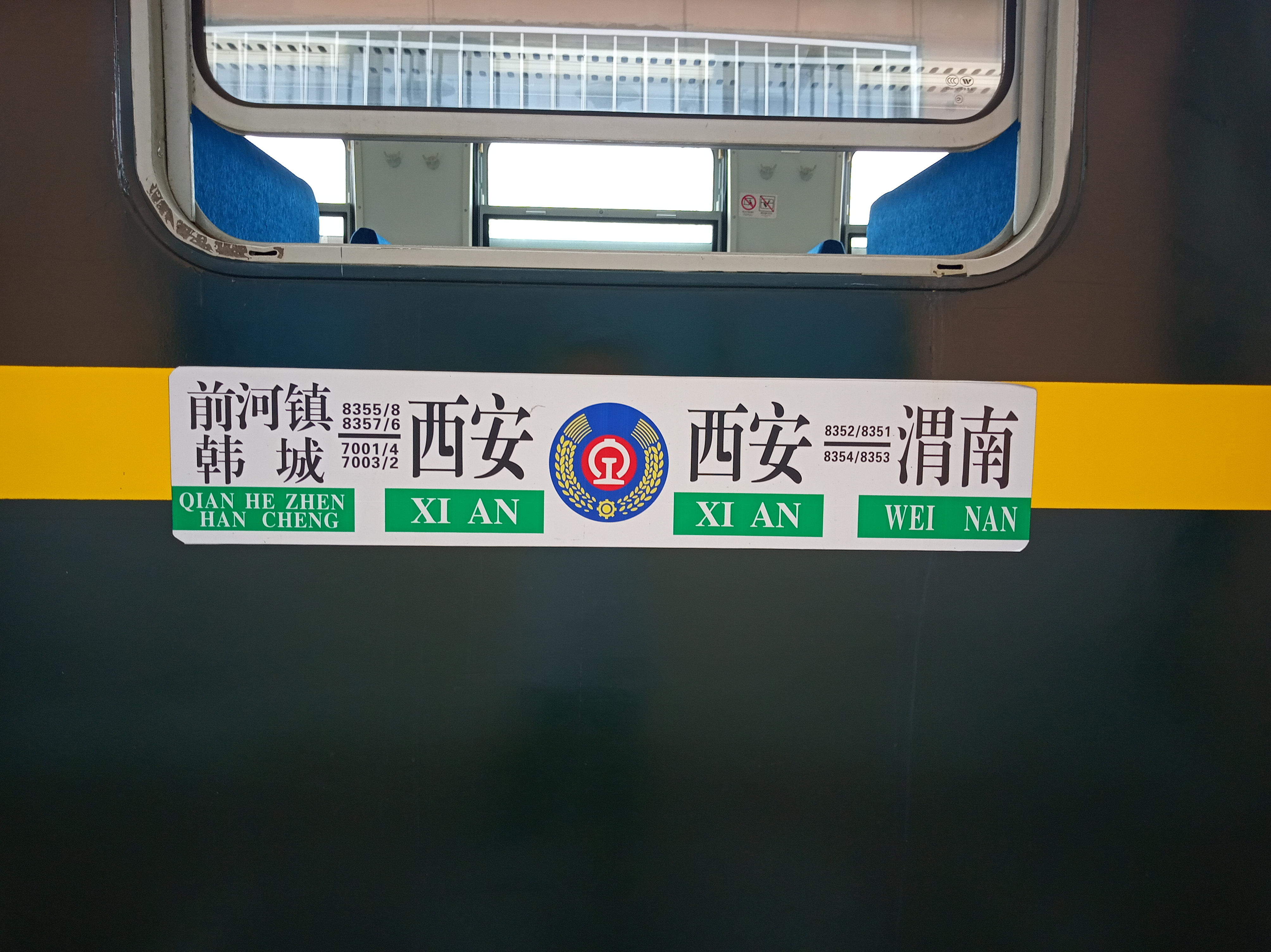 7001套跑水牌，在咸阳站